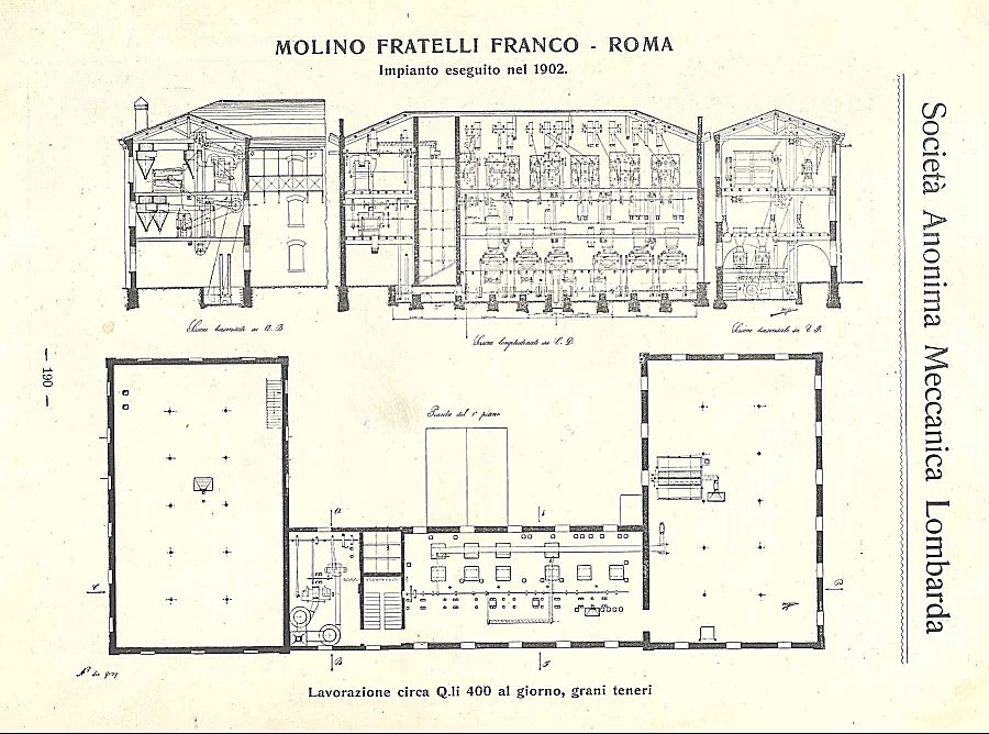 Molino fratelli Franco - Roma - impianto eseguito dalla SAML nel 1902